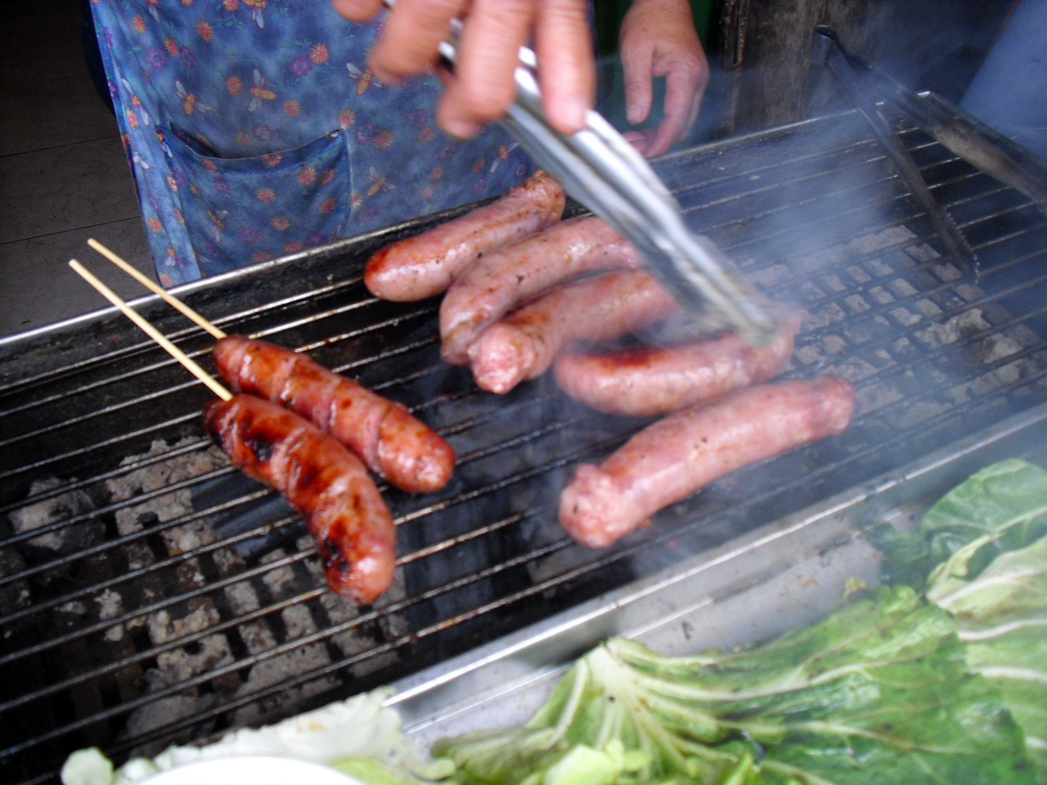 Bân-lâm-gú: 烘煙腸，佇新竹尖石鄉宇老派出所對面彼間店遐翕的。中文（台灣）: 烤香腸，拍攝於新竹尖石鄉宇老派出所對面商店。